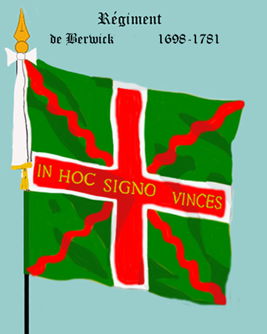 Ordonnanzfahne eines Fremdenregiments im königlich französischen Dienst. - Entnommen und überarbeitet aus: „LES UNIFORMES ET LES DRAPEAUX DE L'ARMÉE DU ROI“ Marseille 1899. (Drapeau d'Ordonnance d' un régiment etranger au service française.)